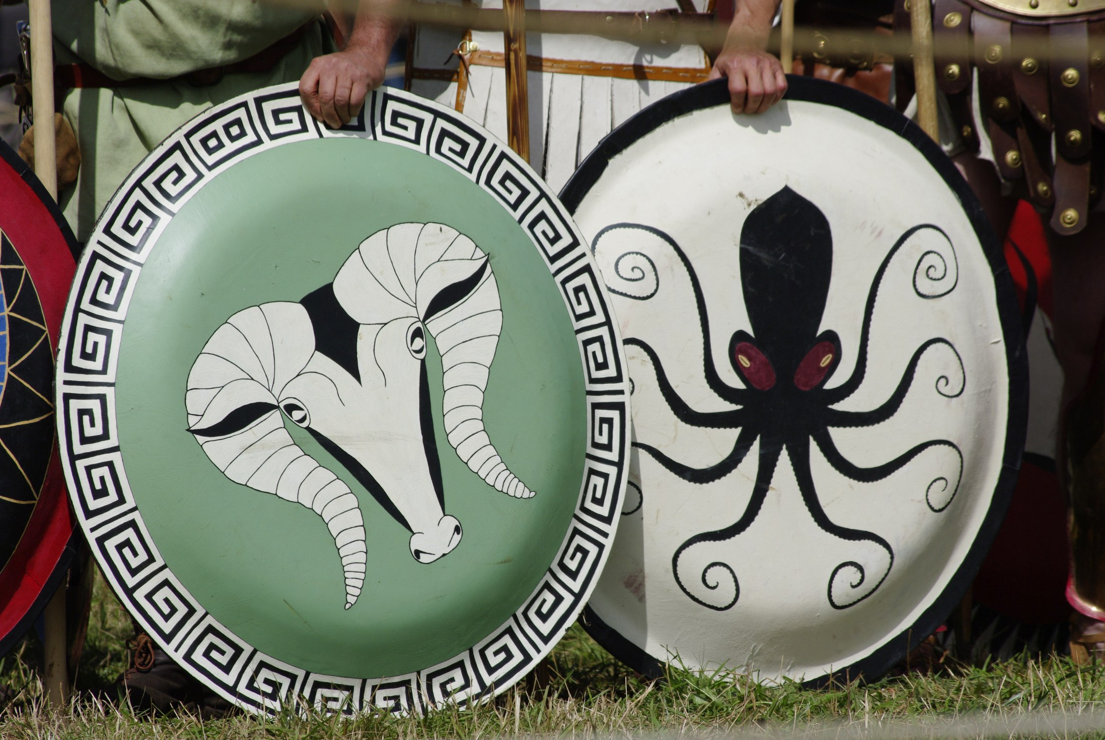 Deux boucliers grecs à figures de type aspis koilè (hoplon). Photographie réalisée lors de la 10ème édition des Arverniales le 24 juillet 2011 sur le plateau de Gergovie, Puy-de-Dôme.